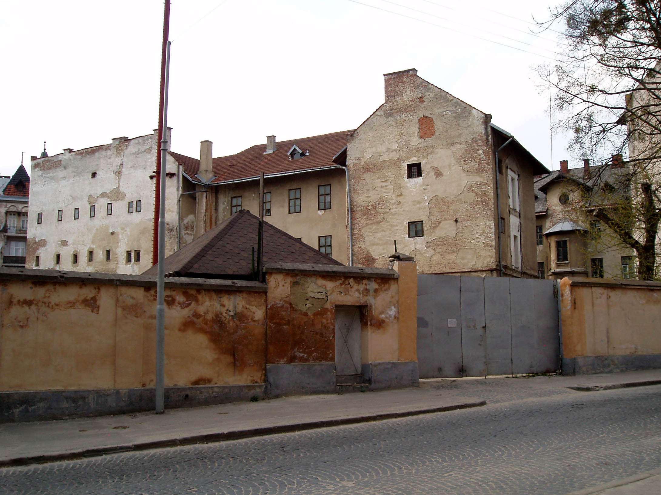 Будинок № 1 на вулиці Бандери у Львові